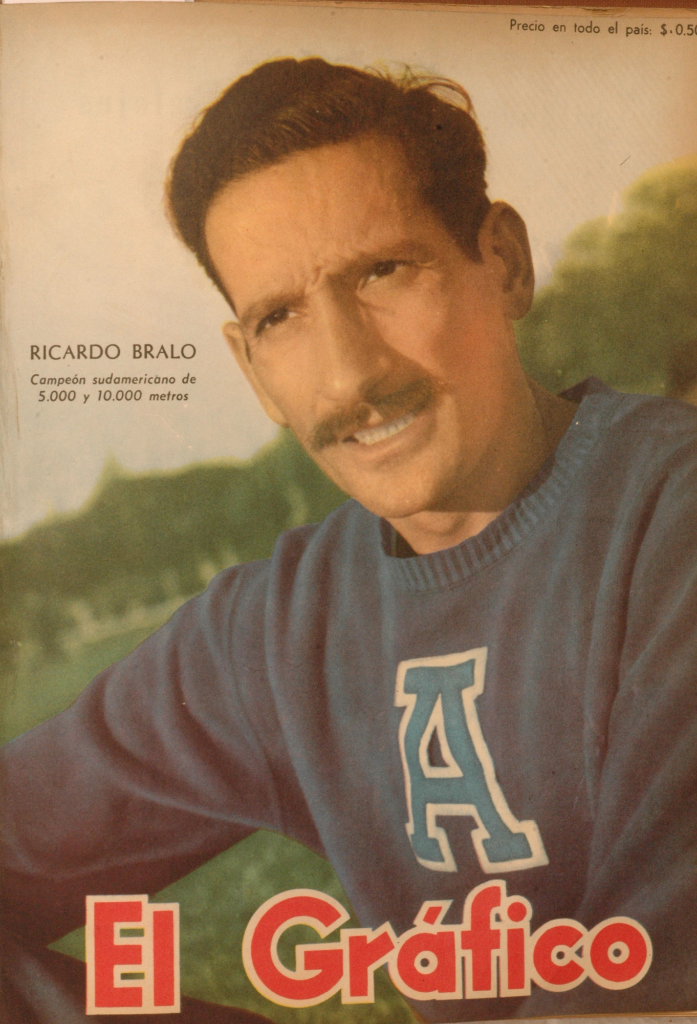 El Grafico del 20 de Mayo de 1949. Edicion 1554